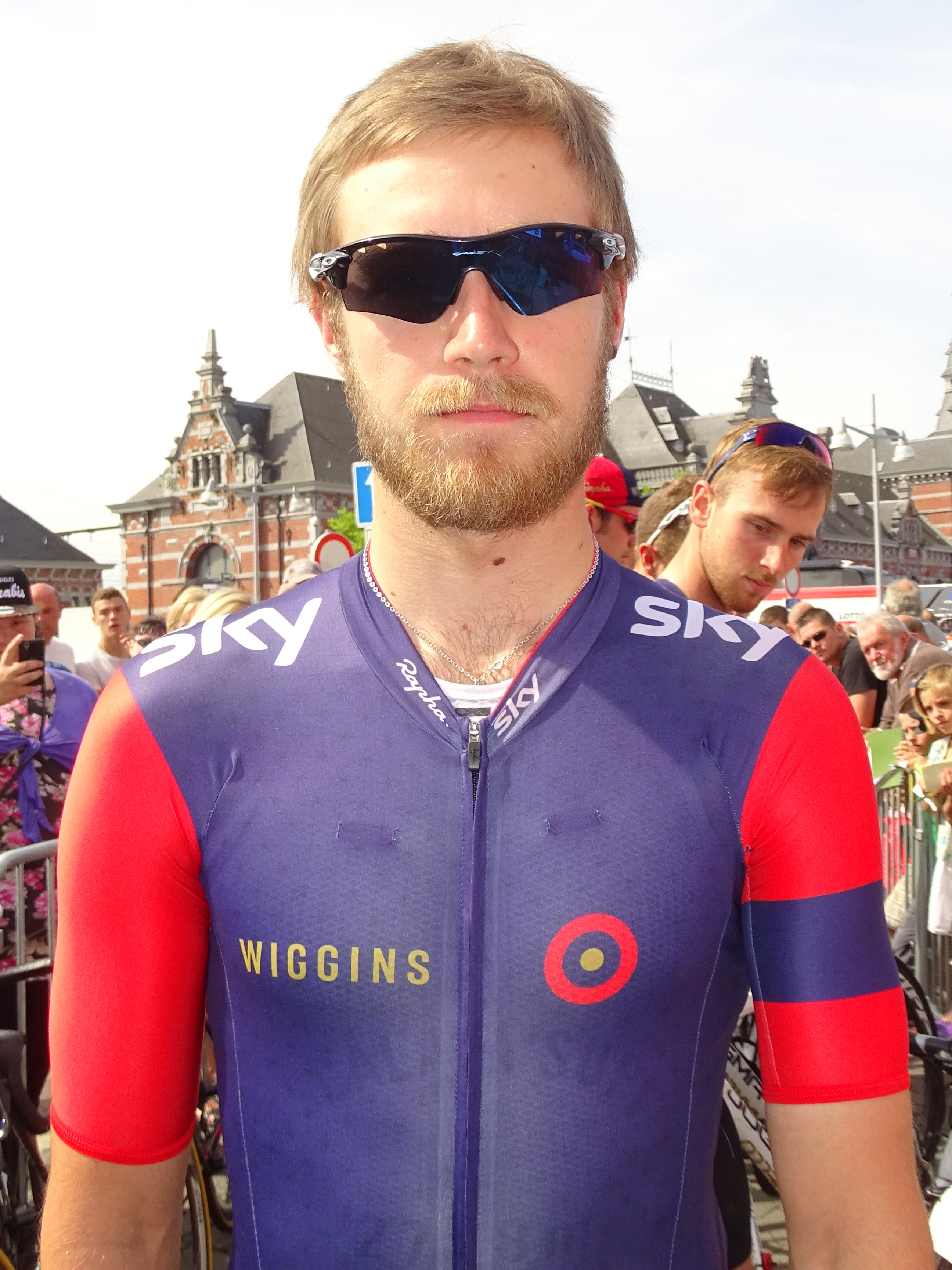 Reportage réalisé le mercredi 22 juillet à l'occasion du départ du Grand Prix Pino Cerami 2015 à Saint-Ghislain, Belgique.